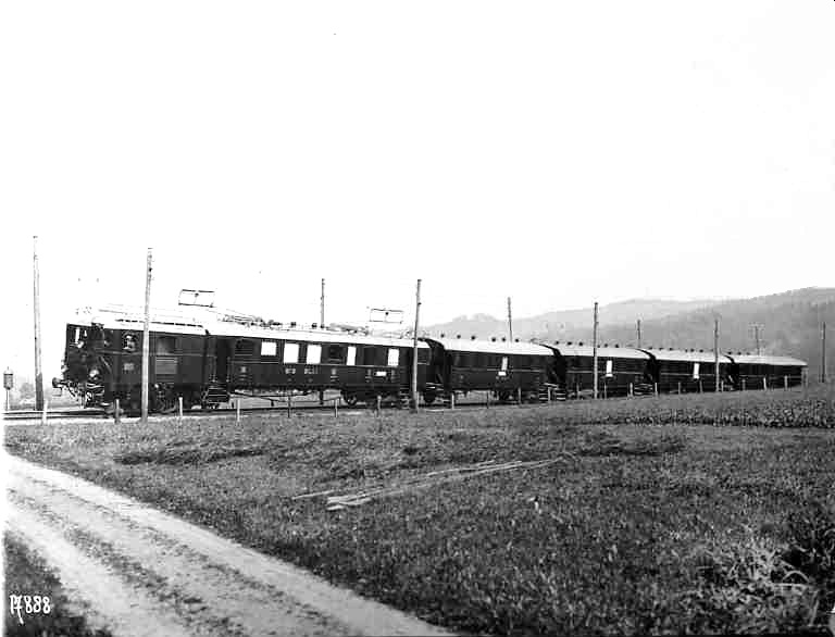 Triebwagenzug der Burgdorf-Thun-Bahn (BTB) mit BCe 2/5, drei Drittklasswagen C und einem Personenwagen mit Gepäckabteil CF bei Konolfingen